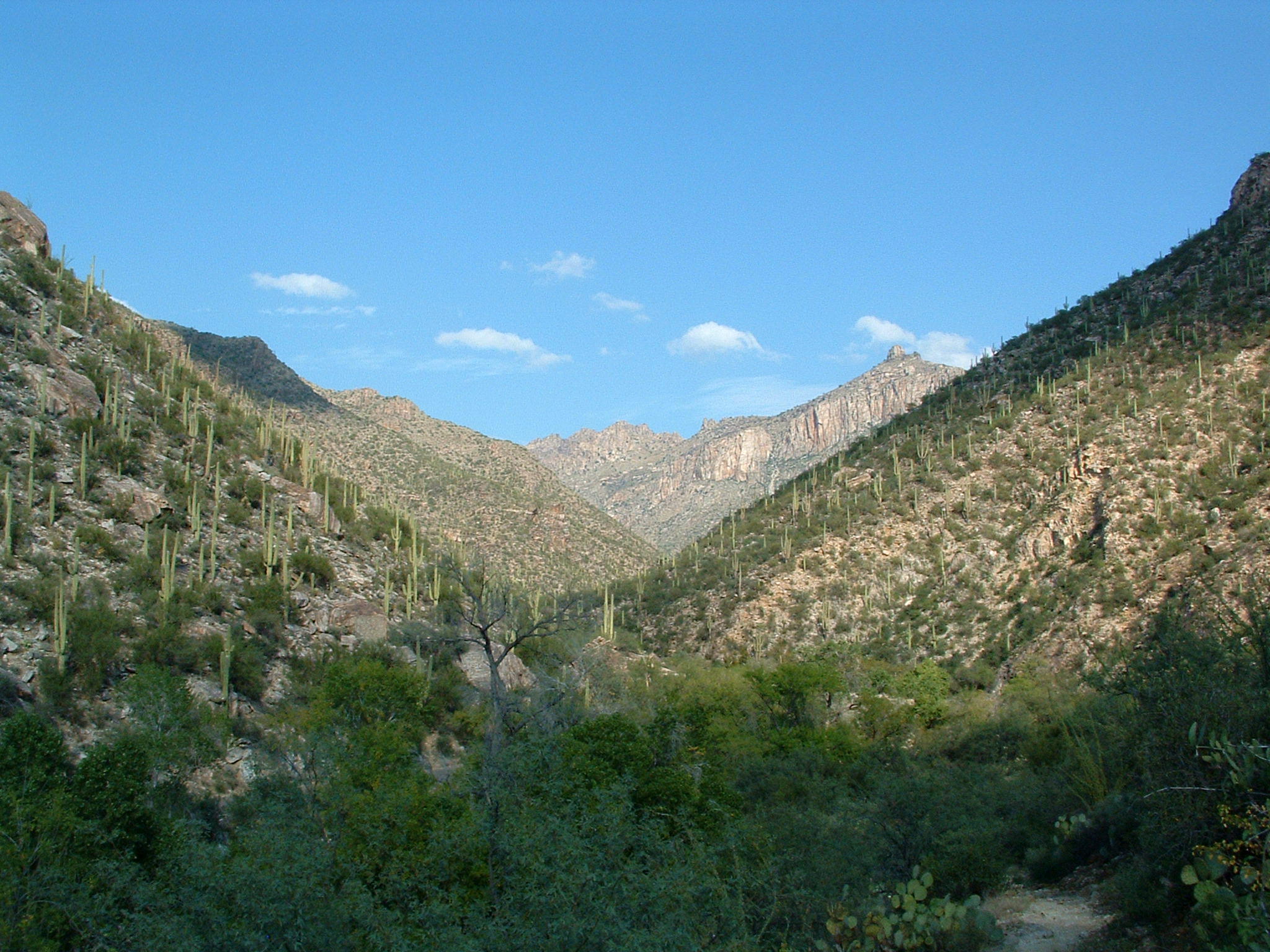 Sabino Canyon in 2002